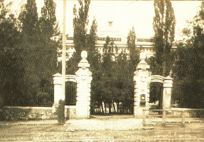 Єлисаветградське земське реальне училище (Кіровоград), поч. XX століття